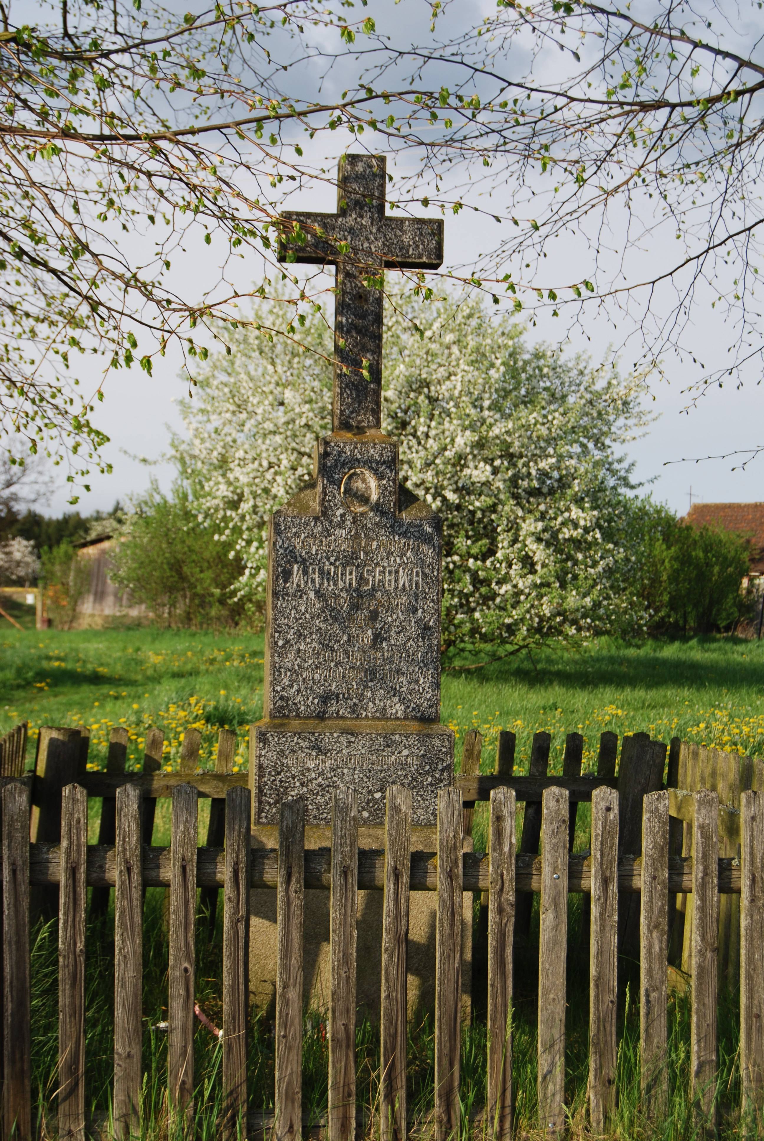 Kříž u komunikace k obci Jetětické Samoty. Okres Písek. Česká republika.